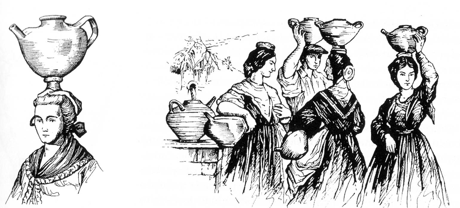 Mujeres vascas portando pedarras (cántaro vizcaíno o pirenaico similar a una gran tetera). Ilustraciones de autor anónimo del siglo XVIII.